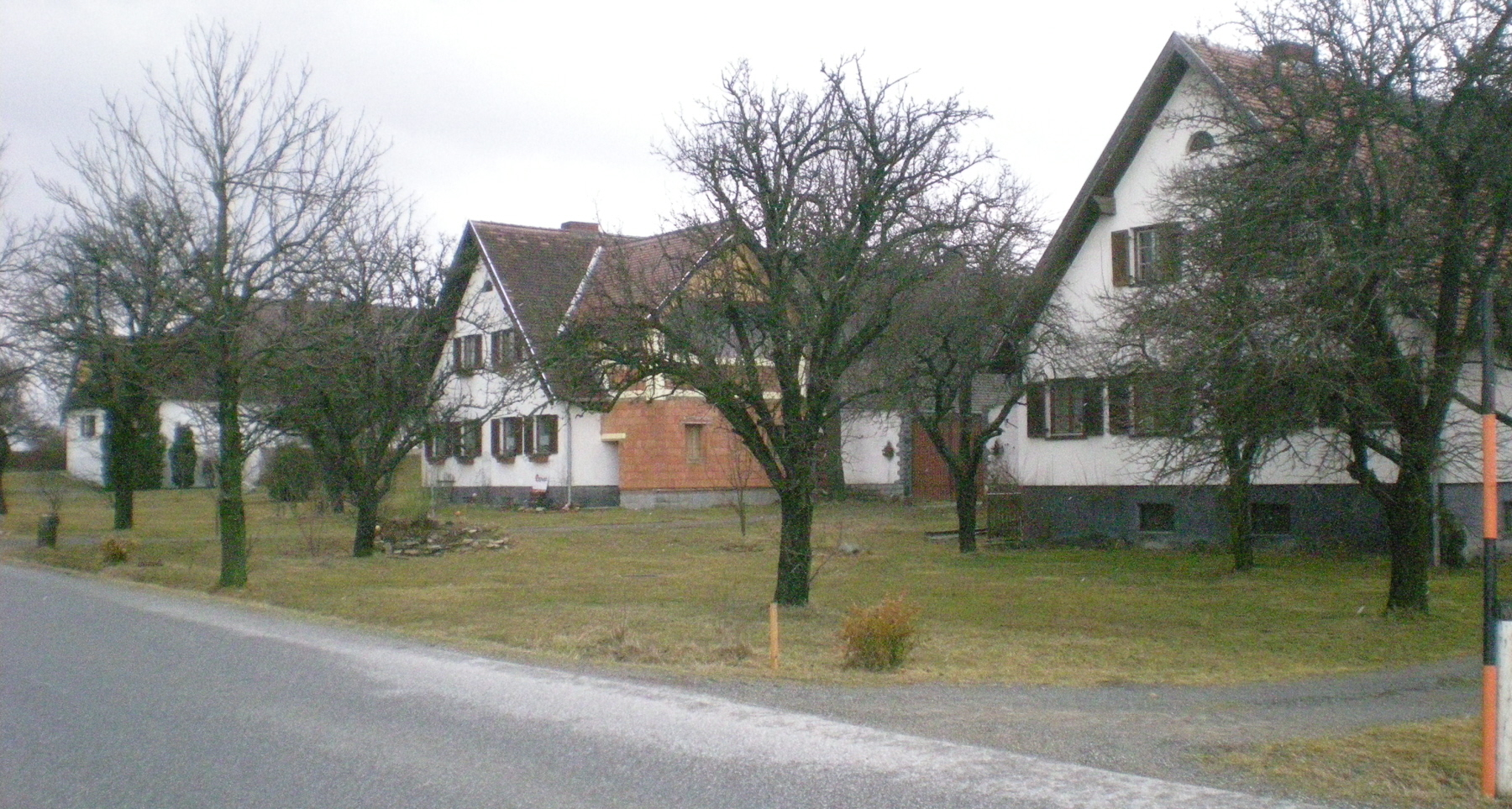 Aussiedler-Siedlung Pyhrahof bei Unterthumeritz in Niederösterreich